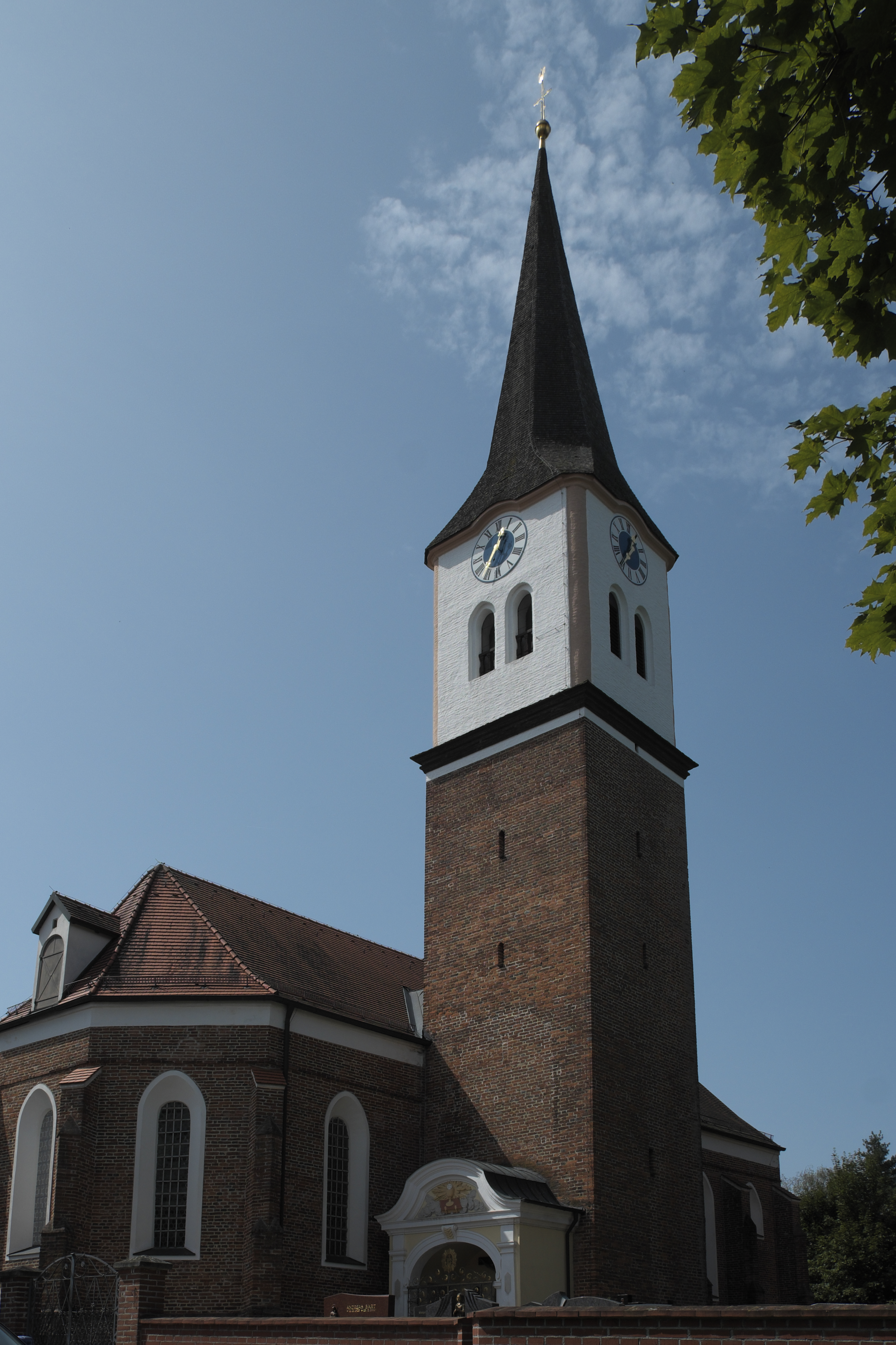 Katholische Pfarrkirche Johannes Baptist und Johannes Evangelist in Steinkirchen im Landkreis Erding (Bayern/Deutschland), Glockenturm